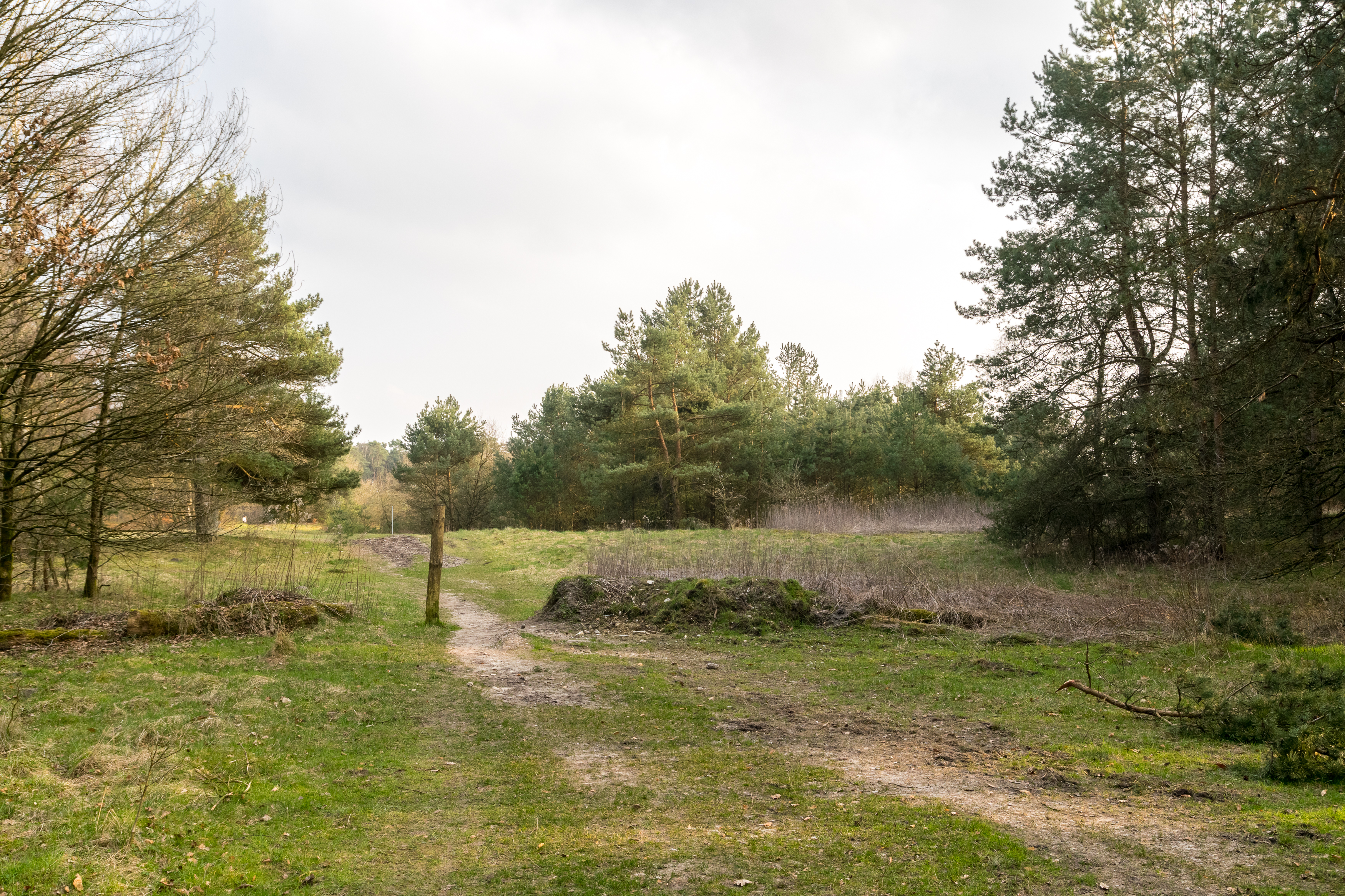 Naturschutzgebiet "Senne nördlich Oesterholz" in Schlangen-Oesterholz, Kreis Lippe